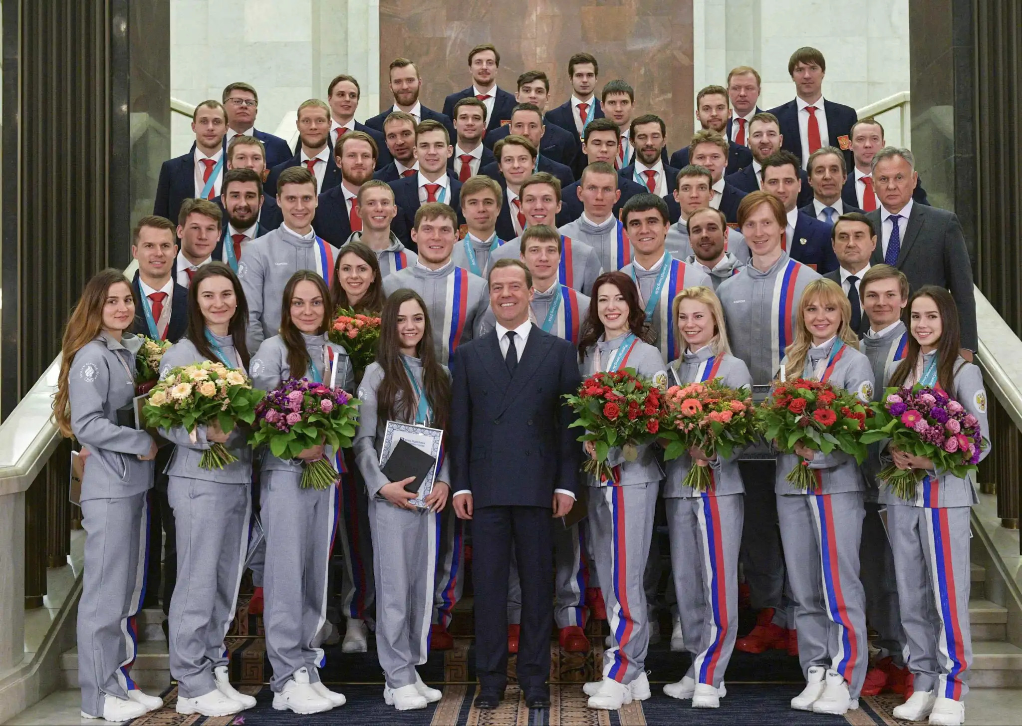 Поздравление победителей и призёров XXIII Олимпийских зимних игр 2018 года в Пхёнчхане